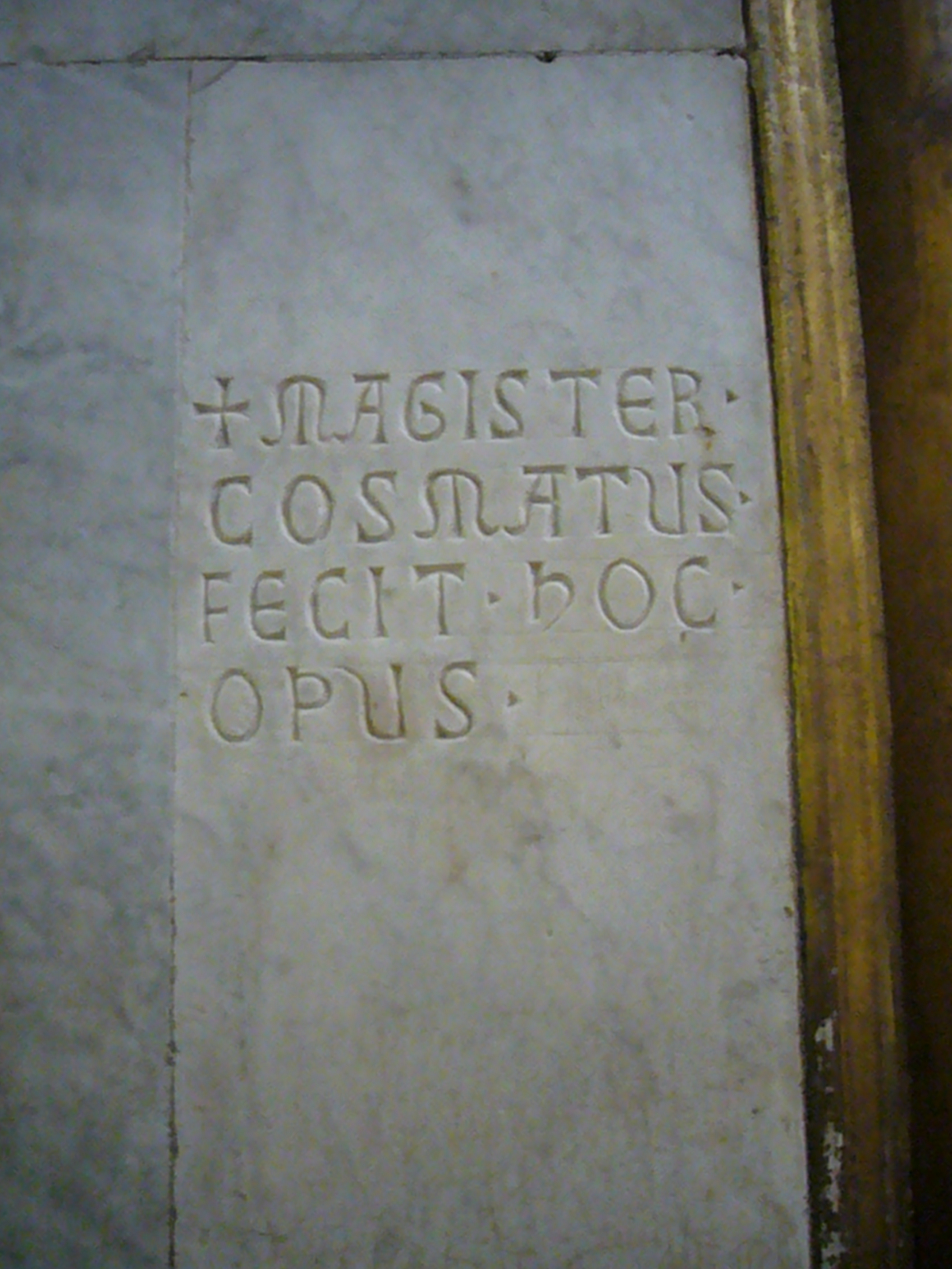 Roma, Sancta Sanctorum al Laterano, firma del Magister Cosmatus sullo stipite delle porta d'accesso alla cappella: "MAGISTER COSMATUS FECIT HOC OPUS"